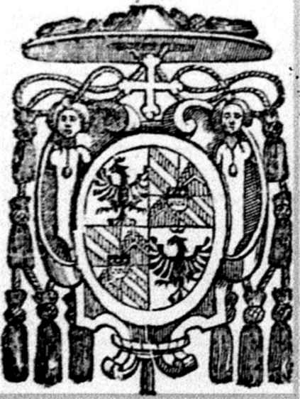 Wappen Kardinal Carlo Gaudenzio Madruzzo (1562-1629)